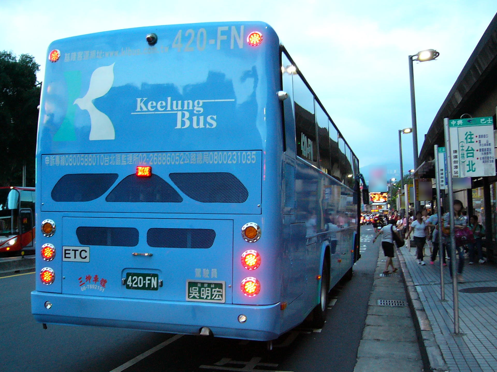 基隆客運日野RN8JRSA大客車420-FN，行駛9006線，停靠臺北捷運劍潭站。